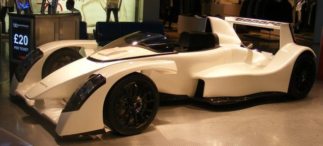 Caparo T1 in Stansted Airport